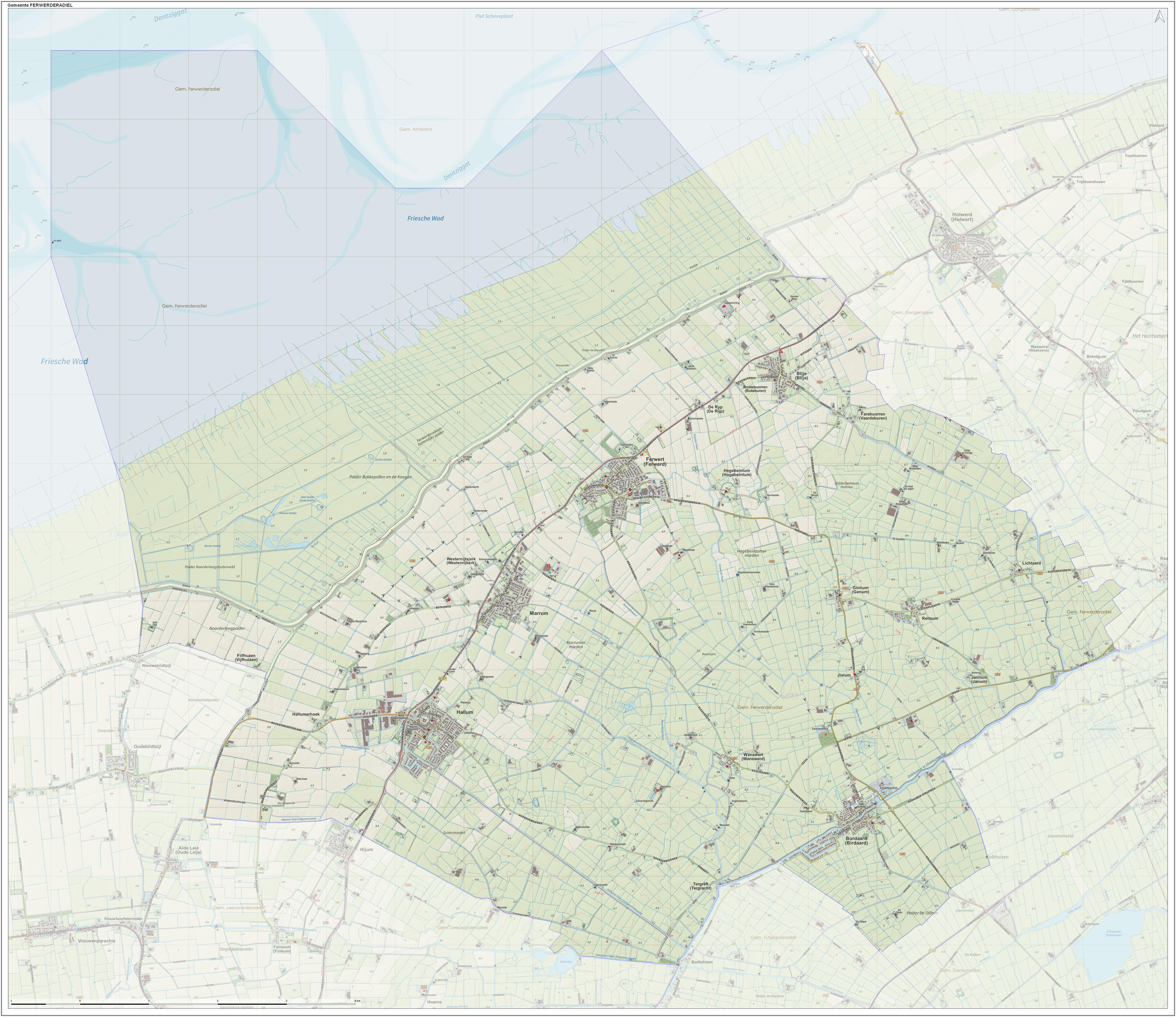 Topografische gemeentekaart. Resolutie: 400 pixels/km. Kaartbeeld samengesteld uit de open geodata van de Top10NL en Top25namen (Kadaster), Creative Commons-BY licentie. Gebouwvlakken uit open geodata BAG extract. Wegen uit de OpenStreetMap, OpenStreetMap community. Reliëfschaduw uit de Actuele Hoogtekaart AHN2. Samenstelling en kleurenschema: Jan-Willem van Aalst, met QGIS. Zie ook de Legenda.